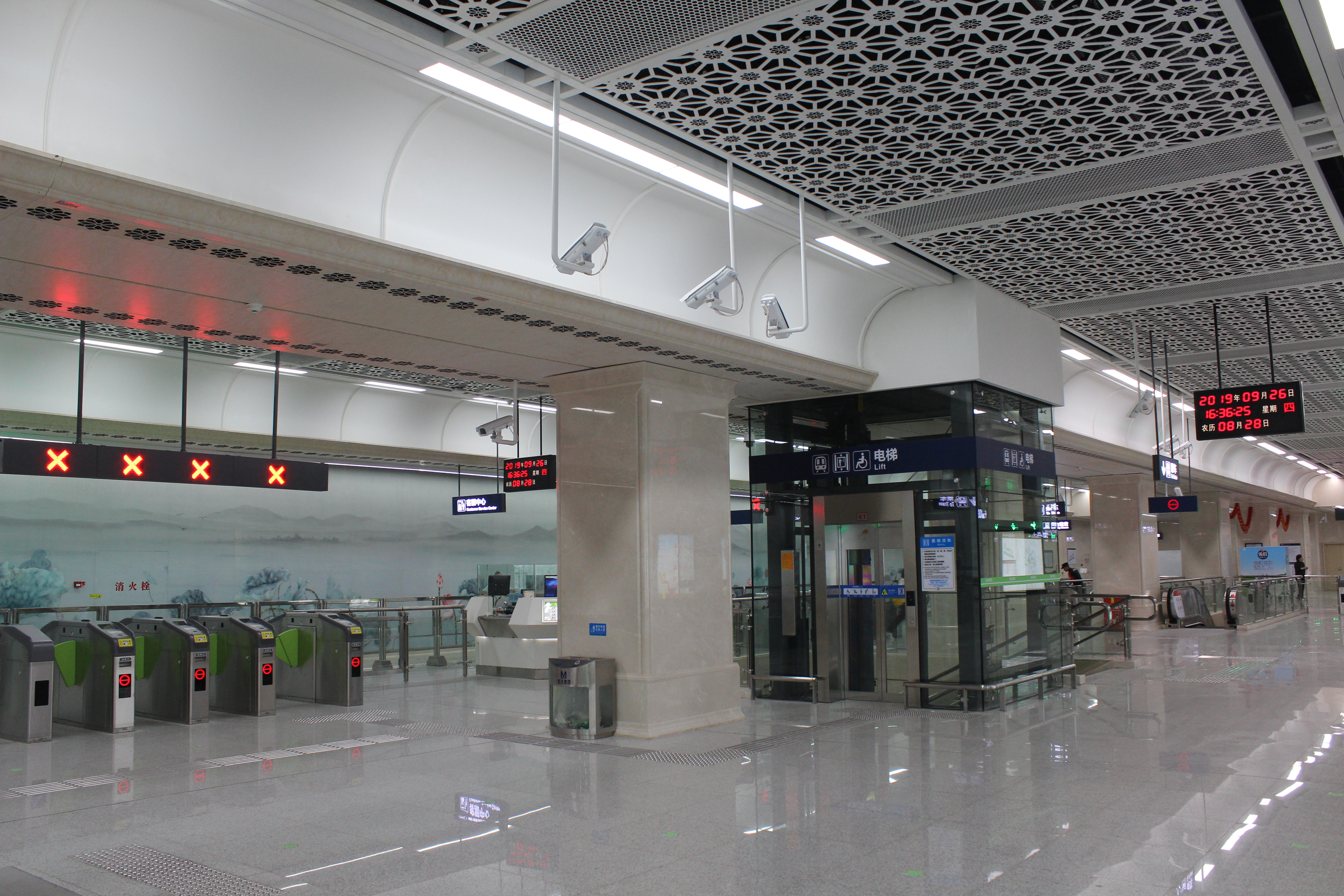 中文（中国大陆）: 武汉轨道交通4号线蔡甸广场站